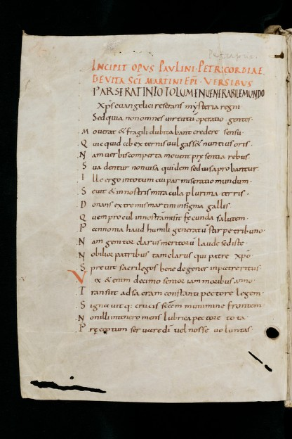 rytu